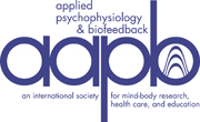 AAPB logo AAPB logo